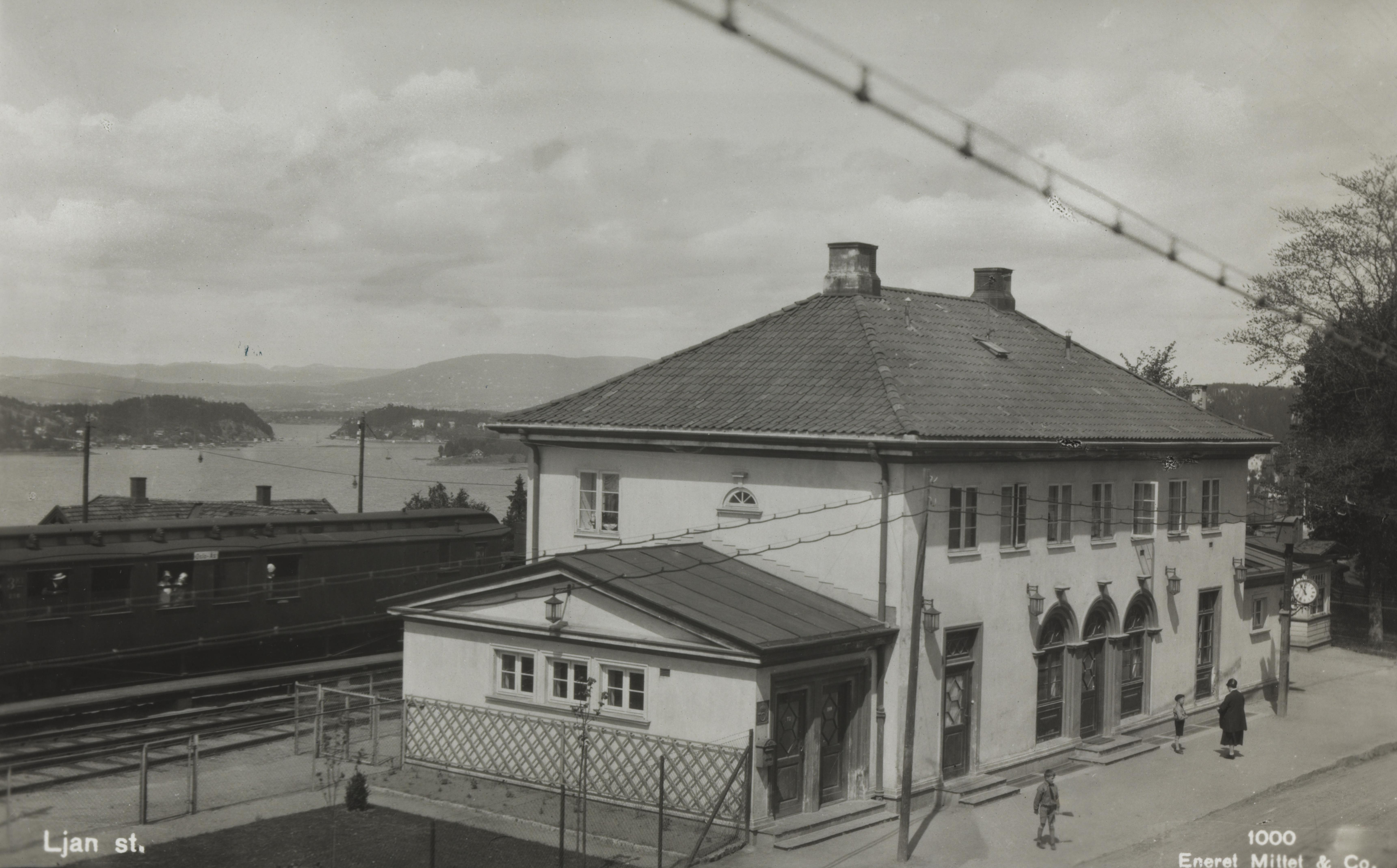 Bildet er hentet fra Nasjonalbibliotekets bildesamling Ljan,Ljan stasjon, Oslo, Oslo